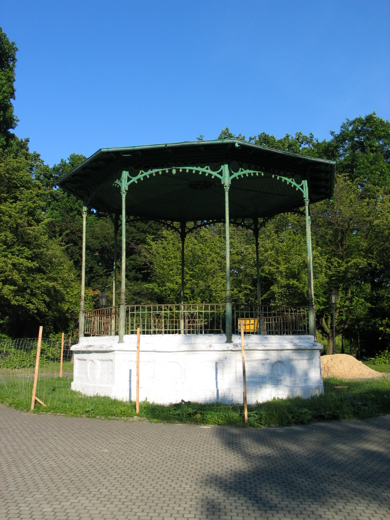 Park Źródliska Łódź